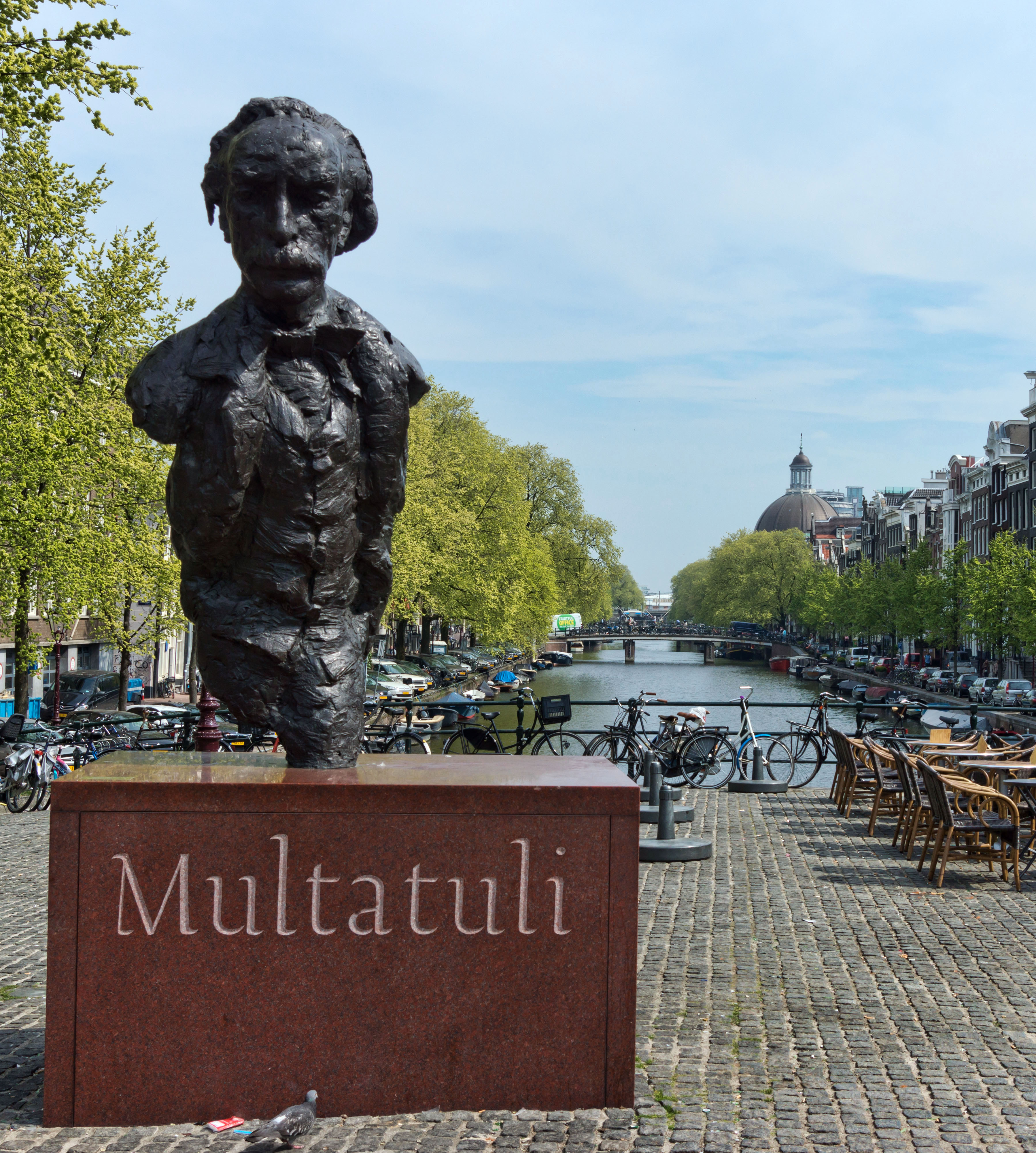 Statue de Multatuli sur le Singel, à Amsterdam